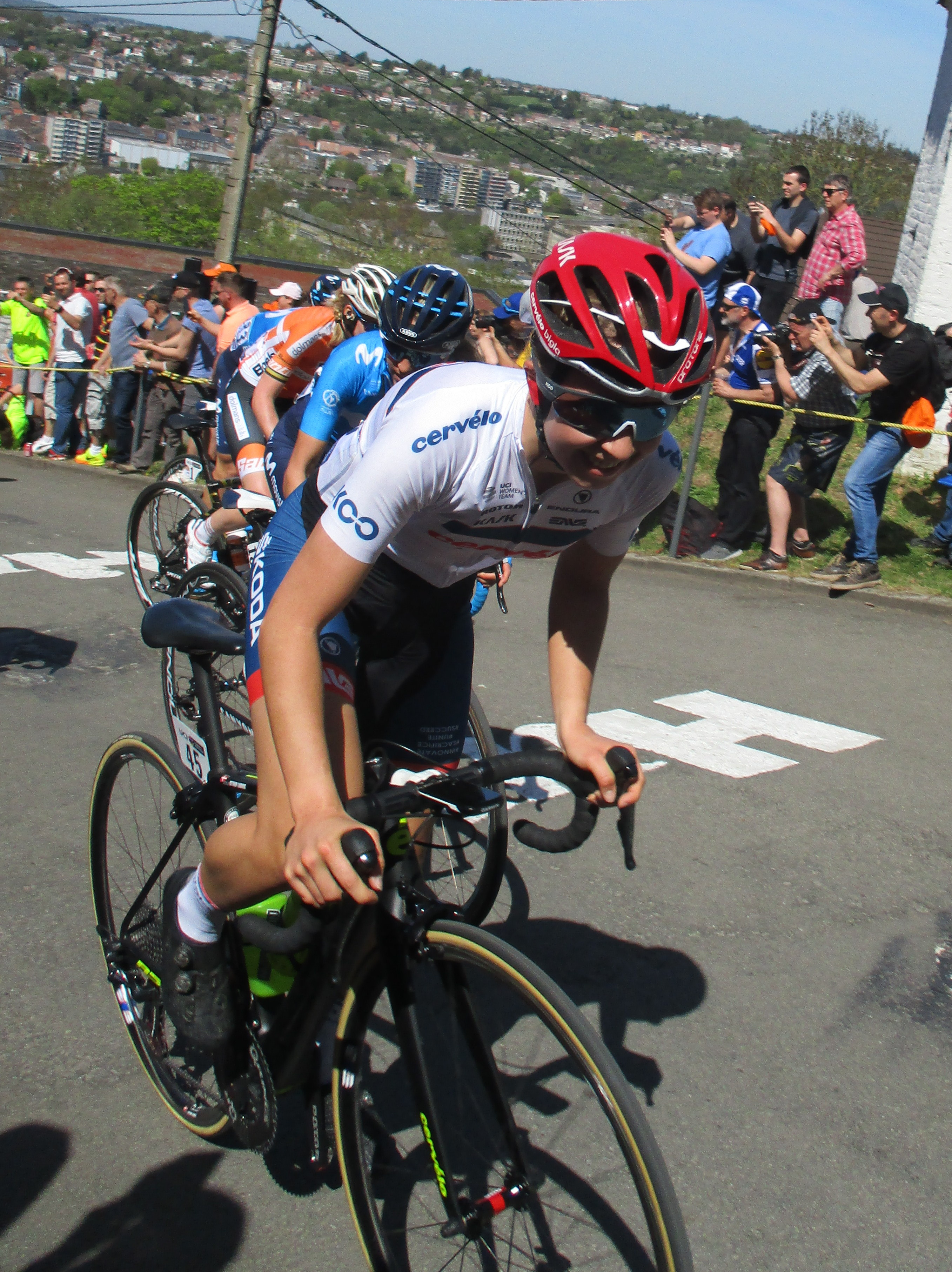 1e passage van de Waalse Pijl 2018 op de Mur van Huy.